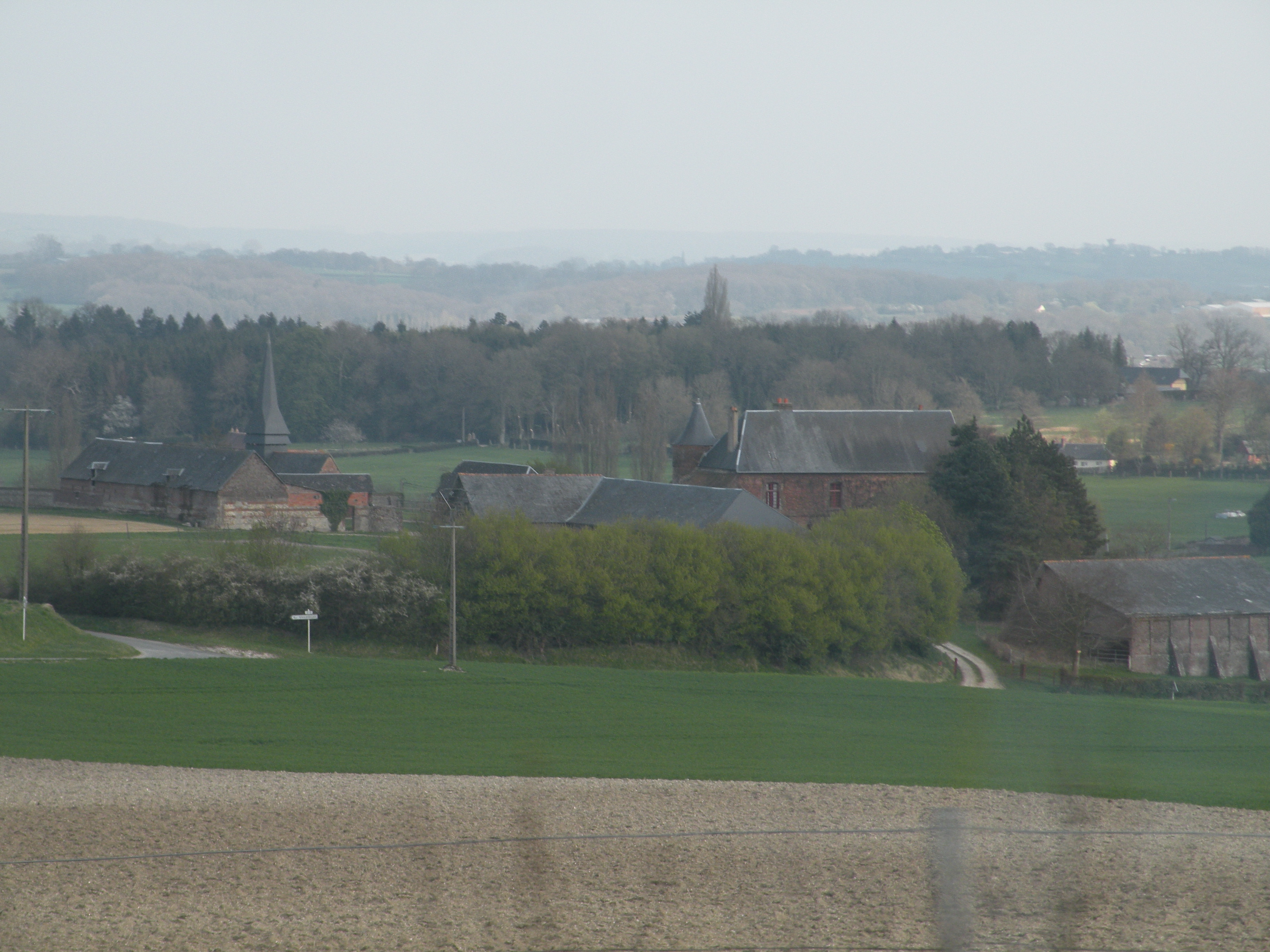 Le bourge d'Esclavelles, vu depuis l'autoroute A28.